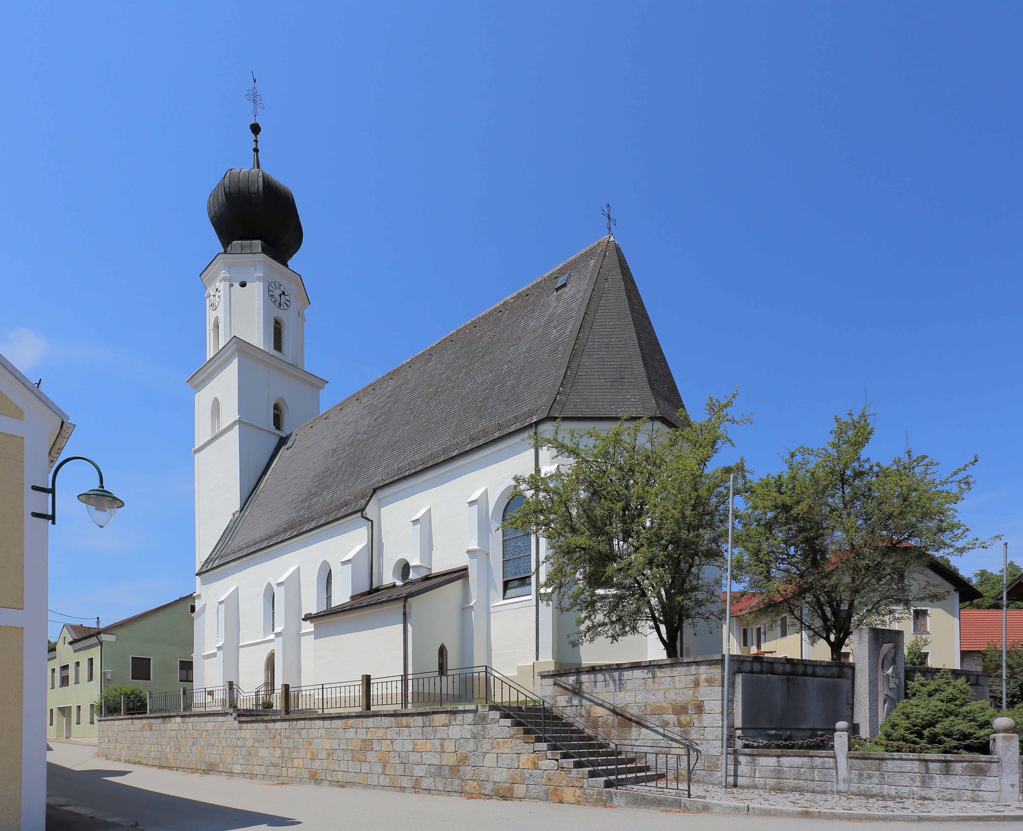 Katholische Pfarrkirche hl. Nikolaus in der oberösterreichischen Gemeinde Enzenkirchen. Eine einschiffige gotische Kirche aus dem 15. Jahrhundert. Der achteckige Turmaufsatz mit dem Zwiebelhelm stammt aus dem 17. Jahrhundert.